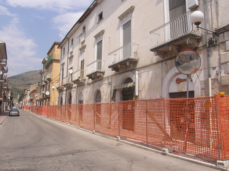 Popoli